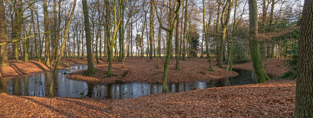 Reste der ehemaligen, hochmittelalterlichen Burg Brockhusen (auch "Versunkene Borg" genannt) in Gescher-Estern.